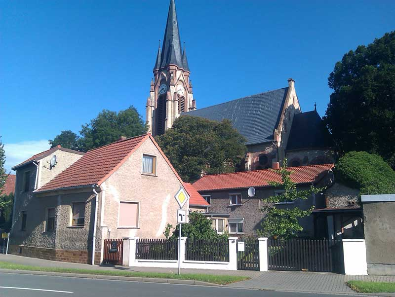 Ortschaft Klein Germersleben